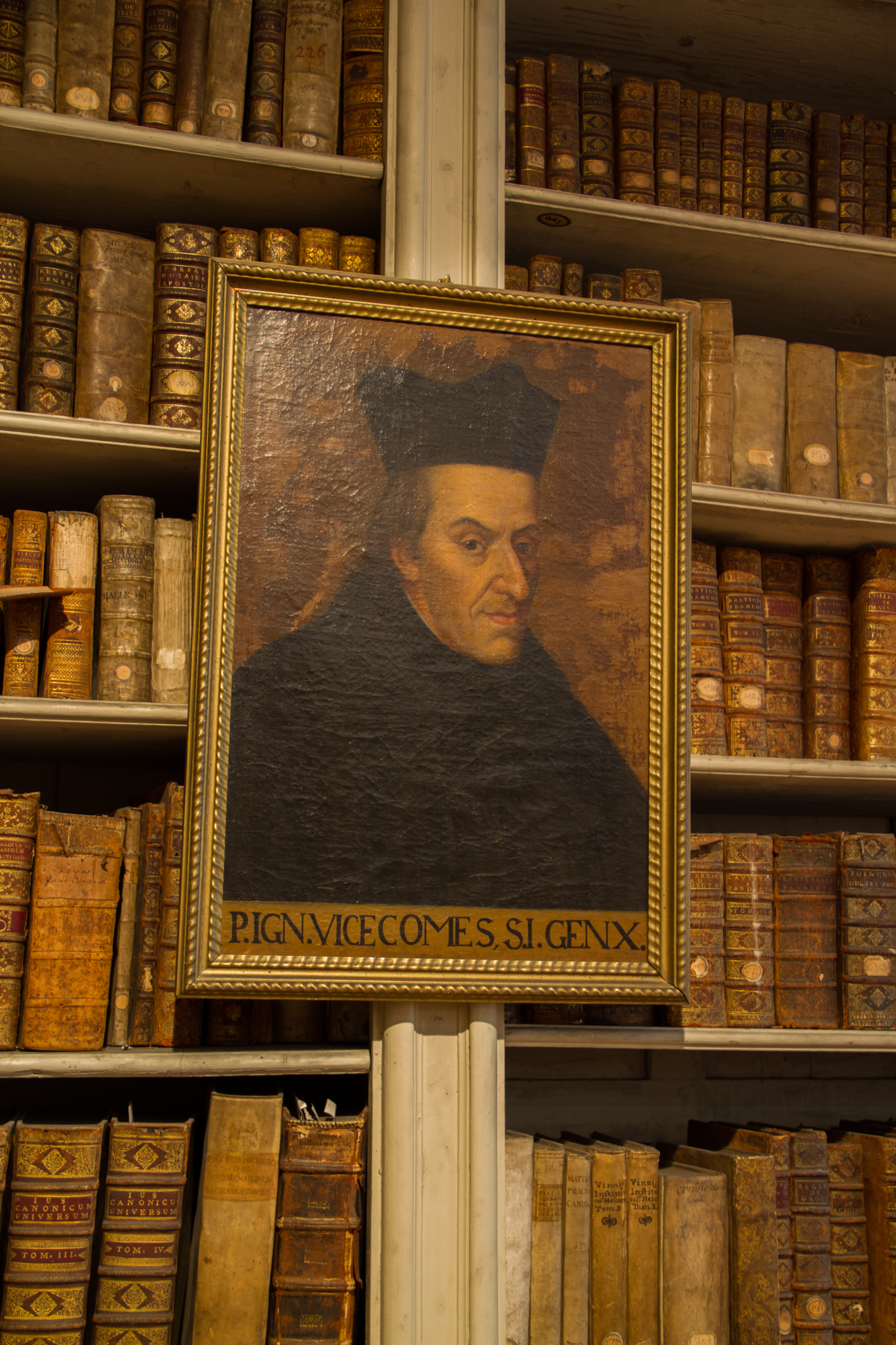 Portrait du prêtre jésuite Ignatius Vicecomes. Bibliothèque du Grand Séminaire de Strasbourg. Conservateur : Louis Schlaefli. Ignacio Visconti, né le 31 juillet 1682 à Milan, Italie et mort le 4 mai 1755 à Rome), était un prêtre jésuite italien. Il fut élu le 16e Supérieur général de la Compagnie de Jésus le 4 juillet 1751.